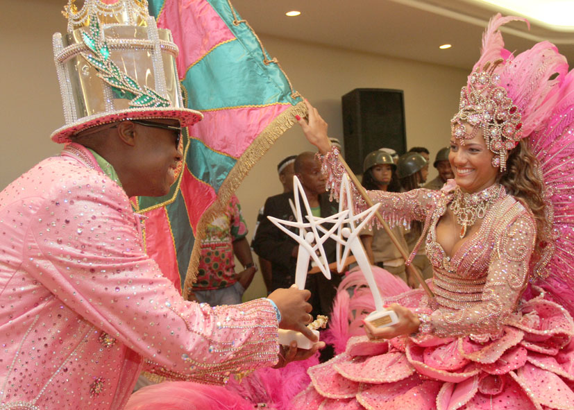 Fotógrafo Henrique Matos